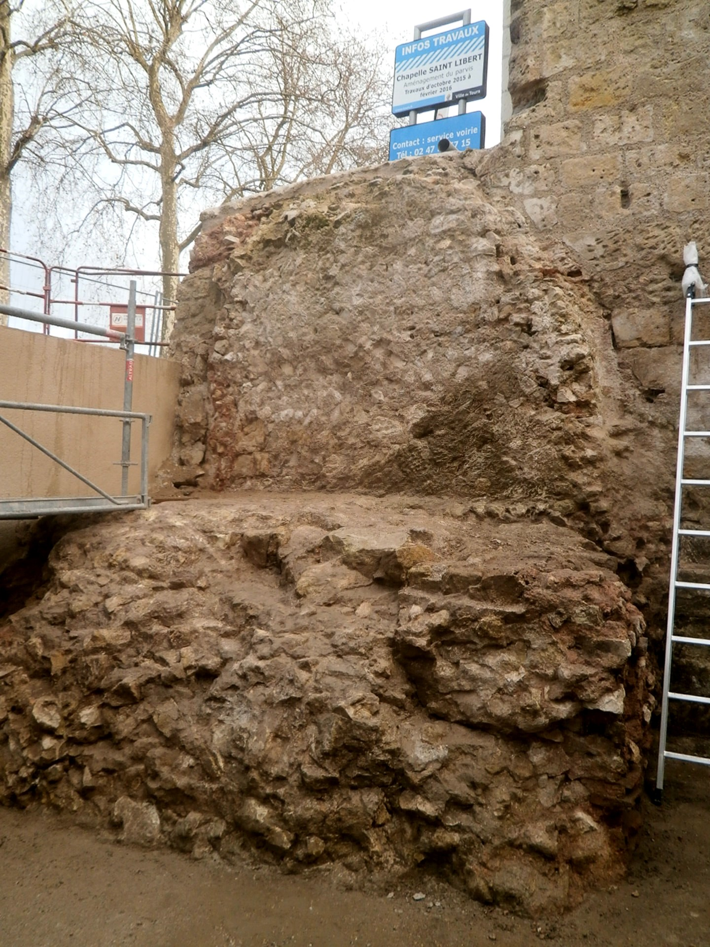 Le mur de l'enceinte gallo-romaine en cours de dégagement à l'angle nord-ouest de la chapelle